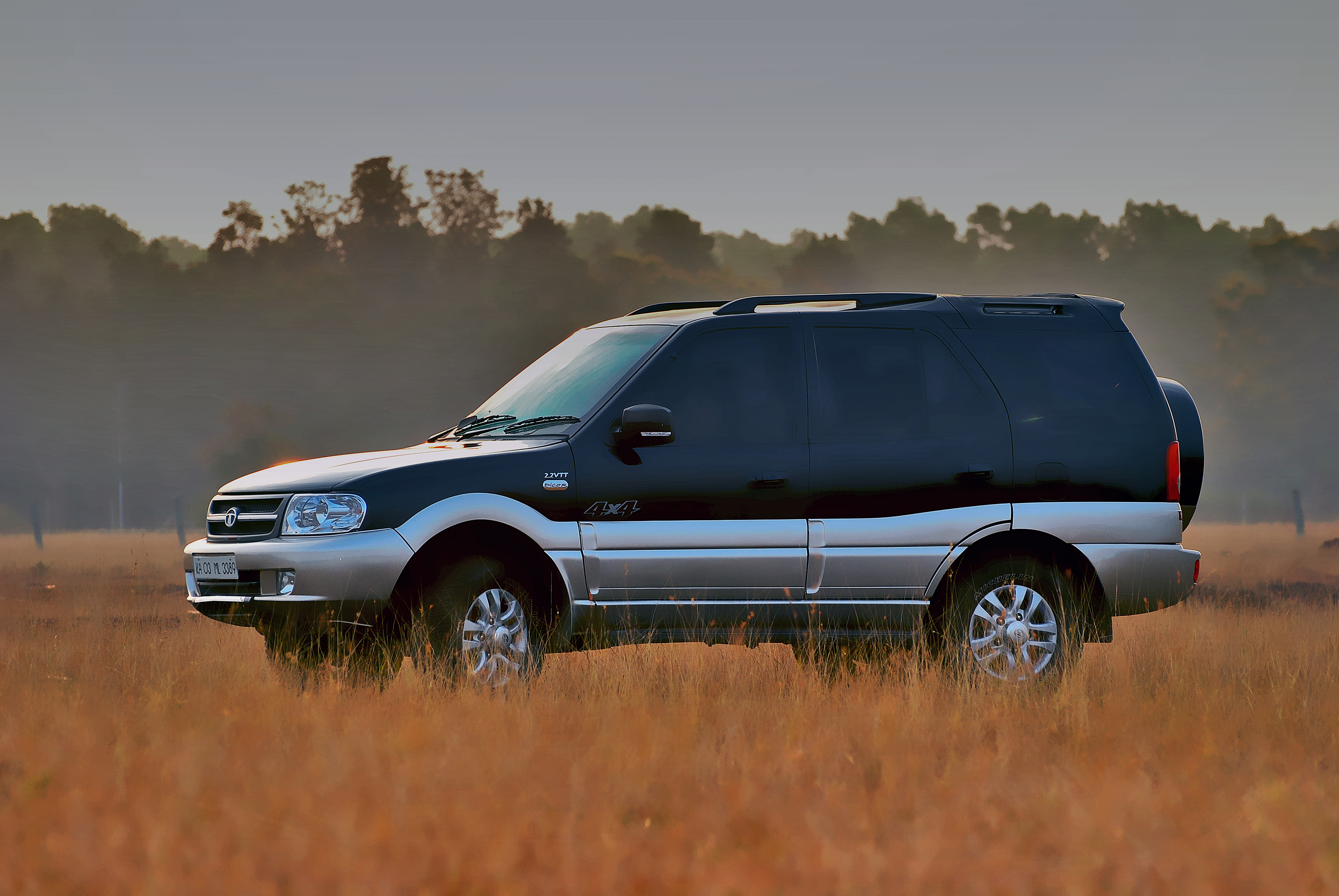 TATA Safari Dicor 2.2